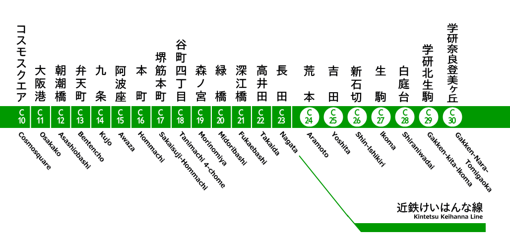 大阪市営地下鉄中央線路線図